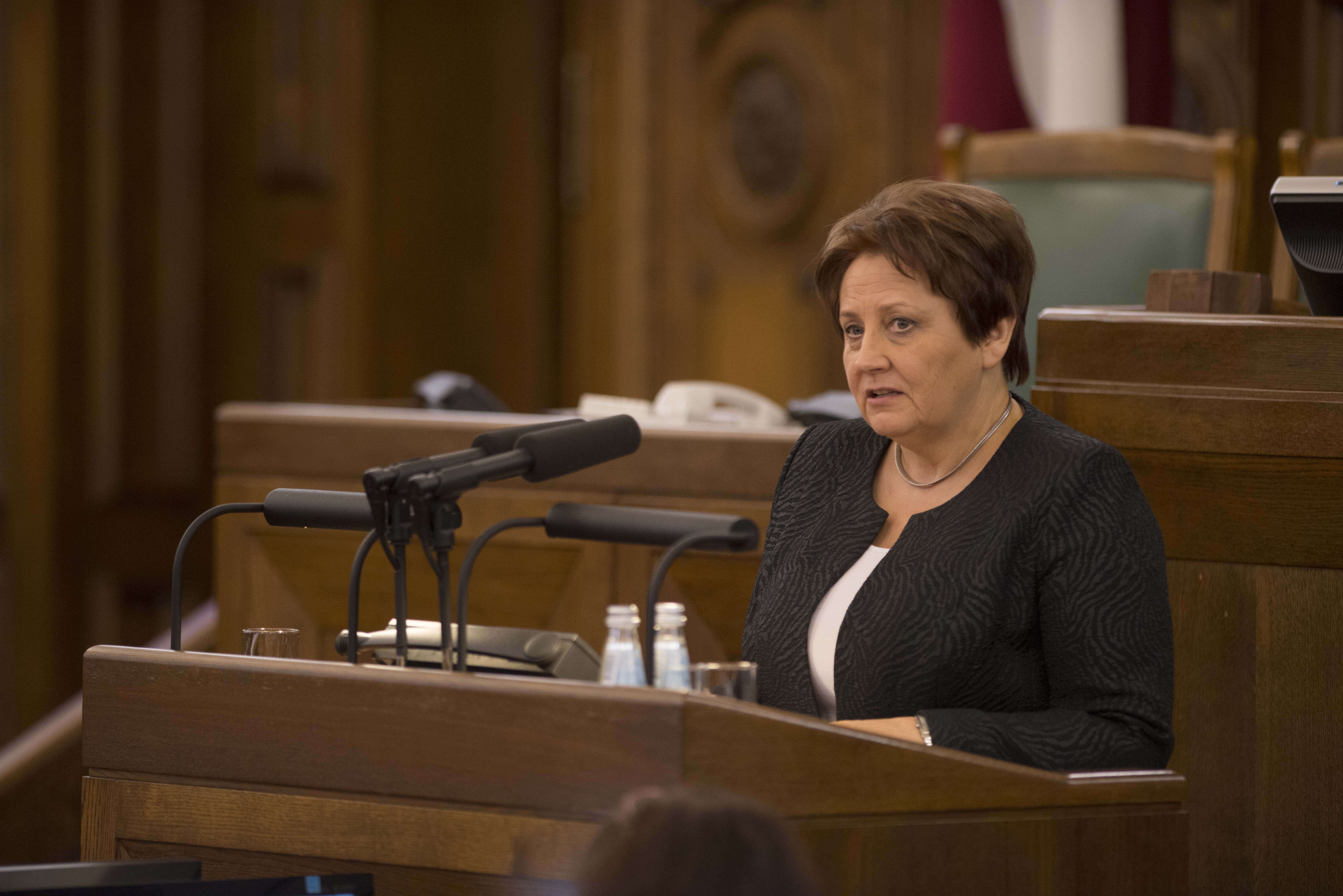 2014.gada 4.novembris. Deputāte Laimdota Straujuma dod svinīgo solījumu. Foto: Juris Vīgulis, Saeimas Kanceleja Izmantošanas noteikumi: saeima.lv/lv/autortiesibas